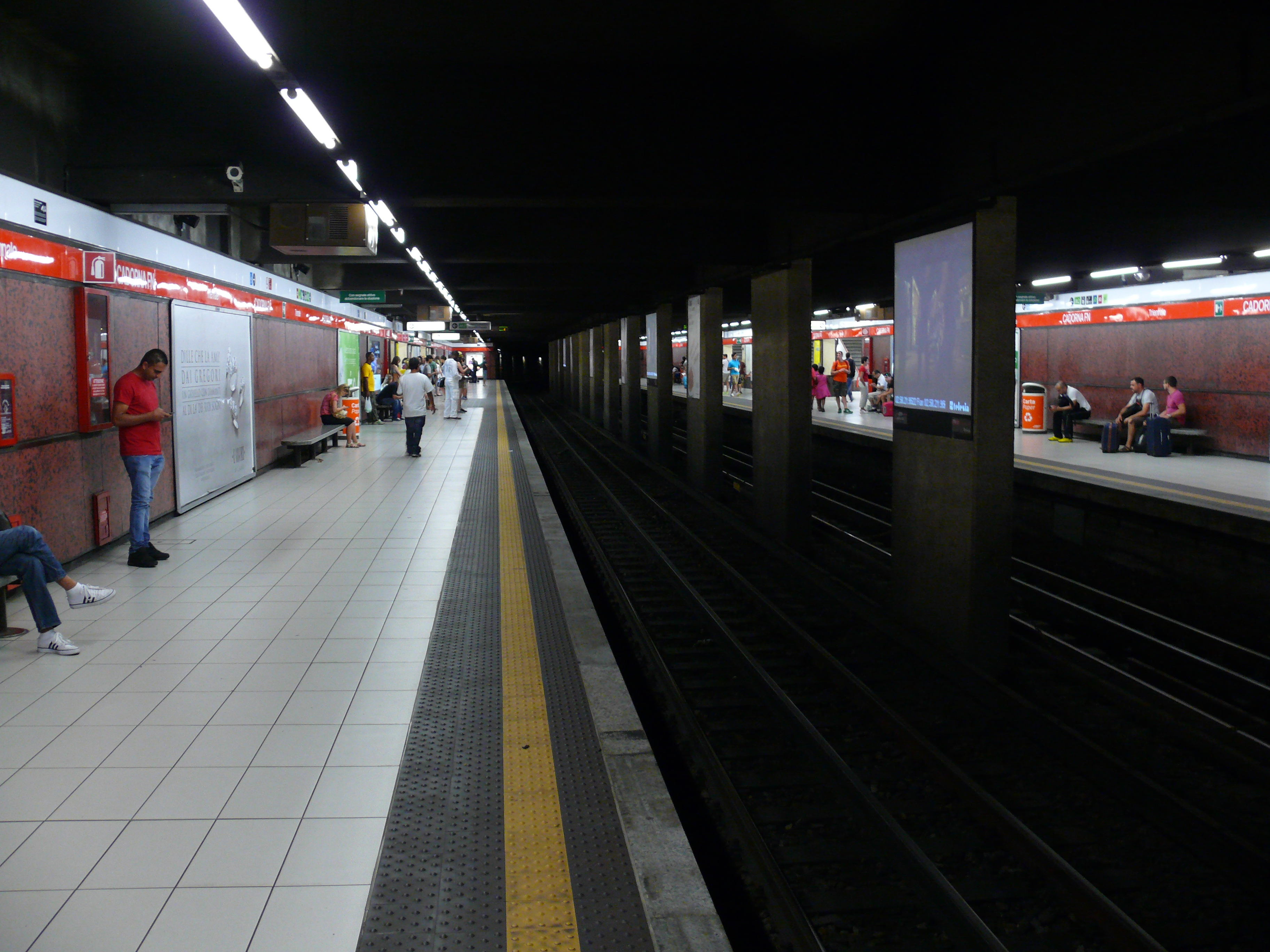 Bahnsteigebene der M1 (Rote Linie) am U-Bahnhhof "Cadorna FN" in Mailand.